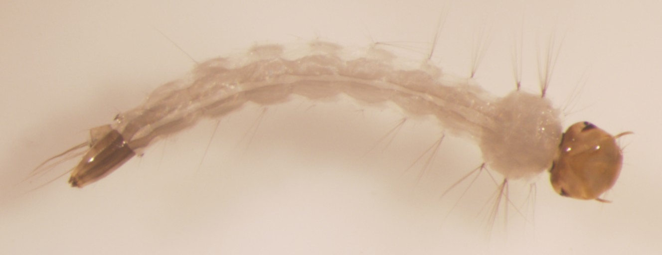 Larva de Aedes aegypti, Rio de Janeiro, Brasil